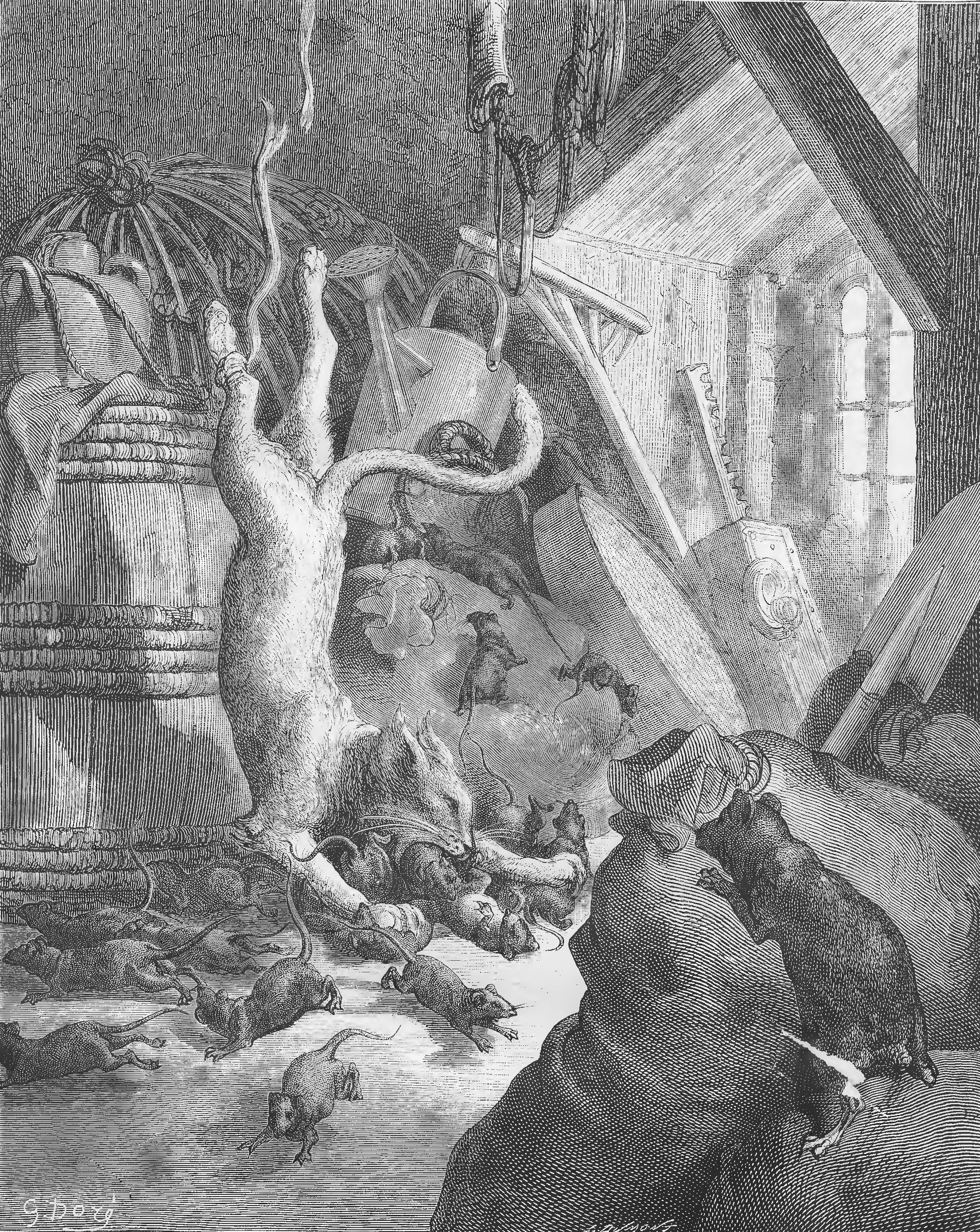 grafika z książki PL publikacja: Nakładem i drukiem Jana Noskowskiego, Warszawa 1876